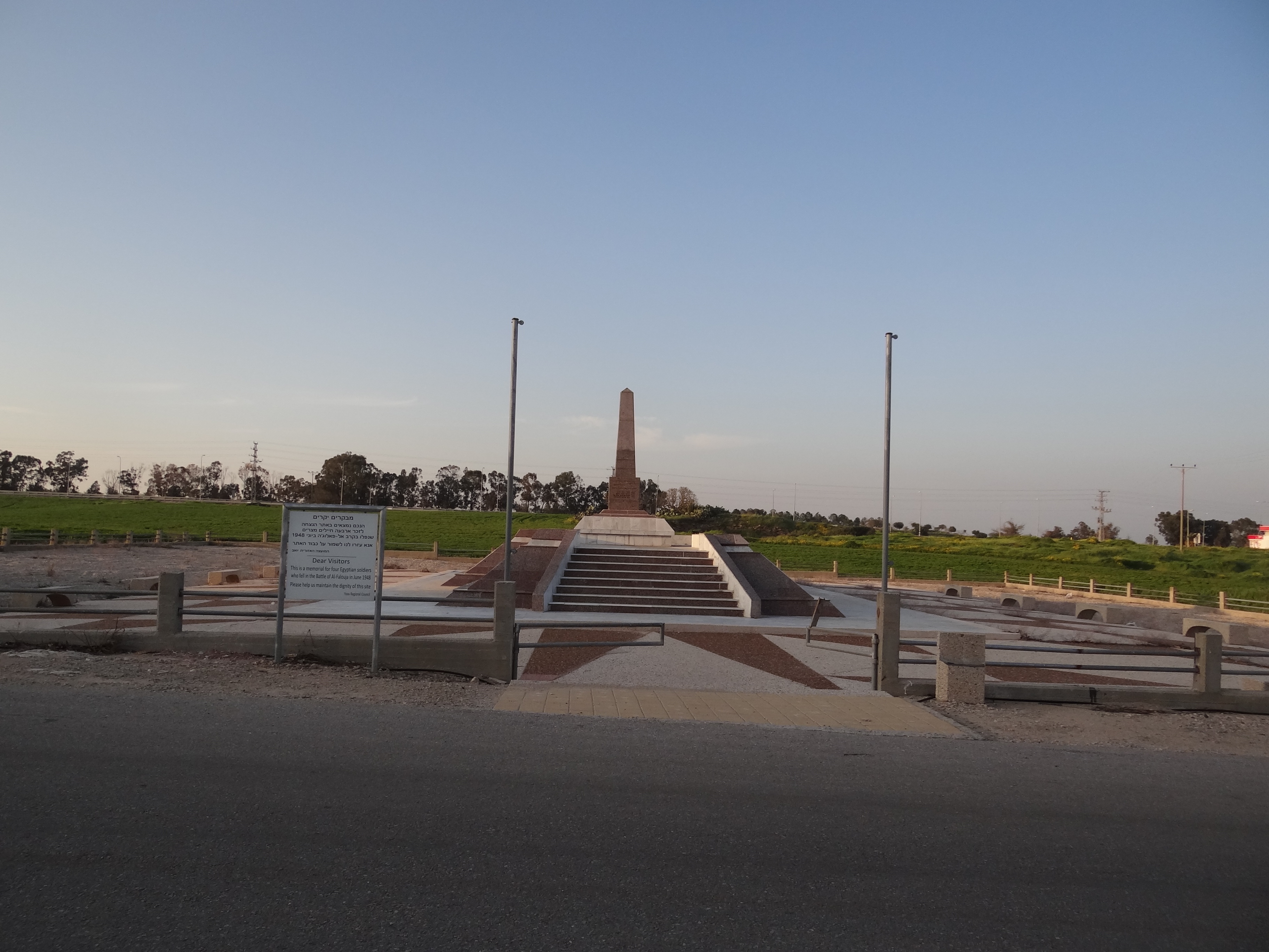 Monument to the memory of four Egyptian soldiers who fell in the battle of Al-Falouja in 1948 אנדרטה לזכר החייל המצרי שהוקמה ליד חמי יואב על כביש 35 מול מצודת יואב לזכר החיילים המצרים שנהרגו בקרב ליד אל פלוג'ה בשנת 1948.